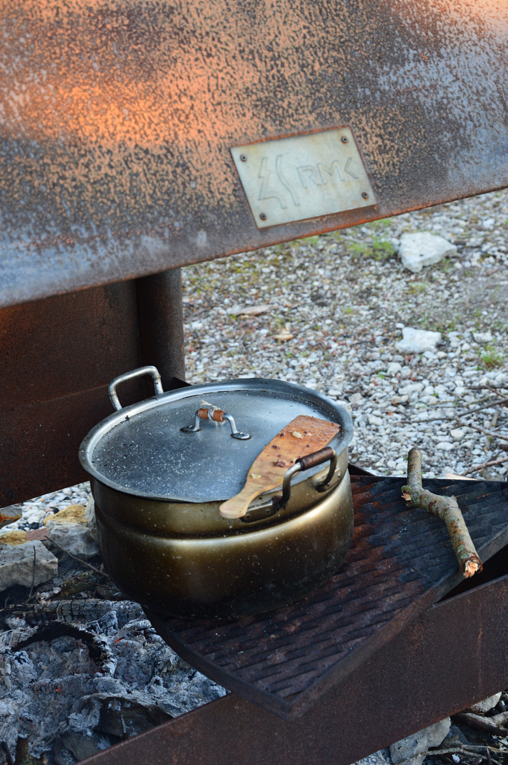 Tahmand alumiiniumpott. Toidu valmistamine lahtisel tulel RMK laagriplatsil Osmussaarel.